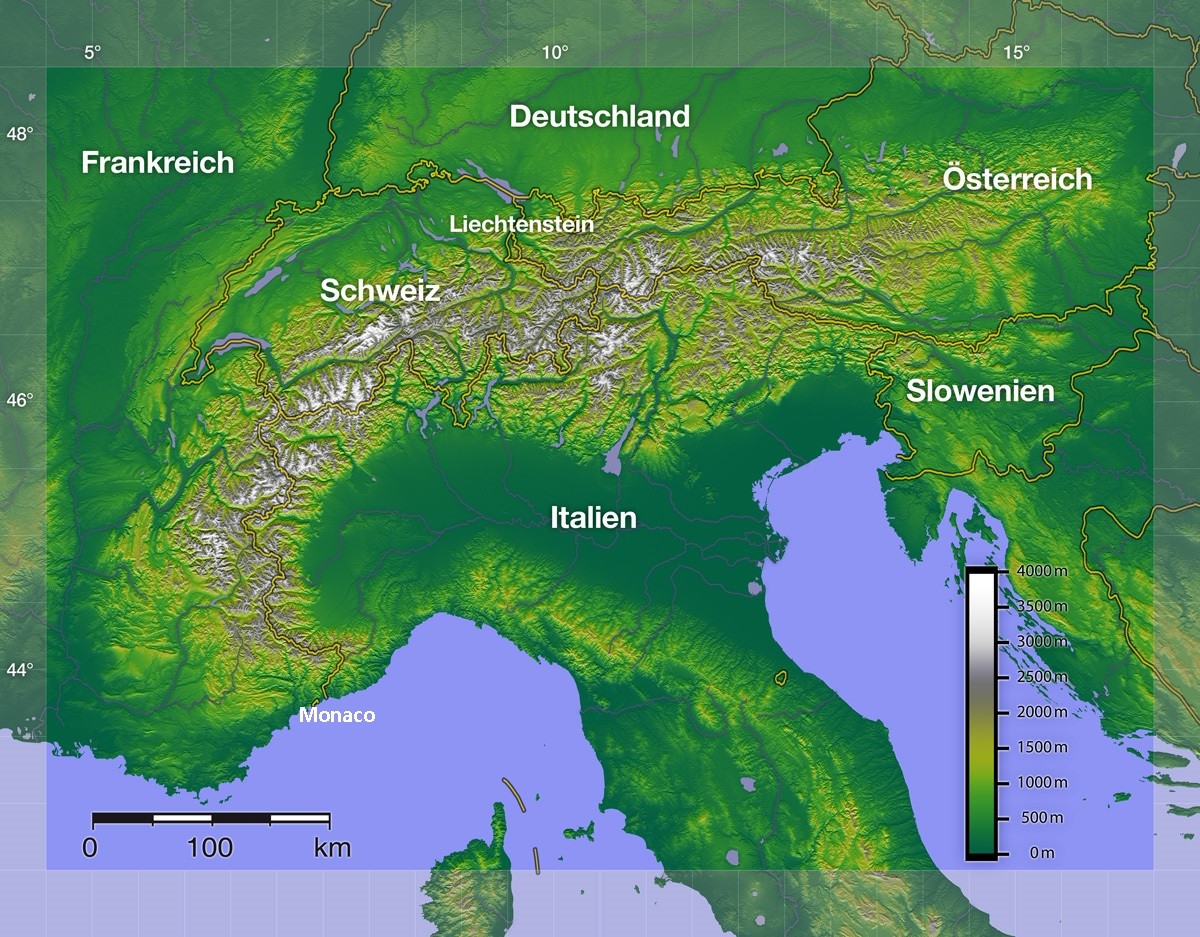 Digitales Relief der Alpen; Frankreich, Italien, die Schweiz, Deutschland, Liechtenstein, Österreich und Slowenien. Erstellt mit SRTM-Daten.